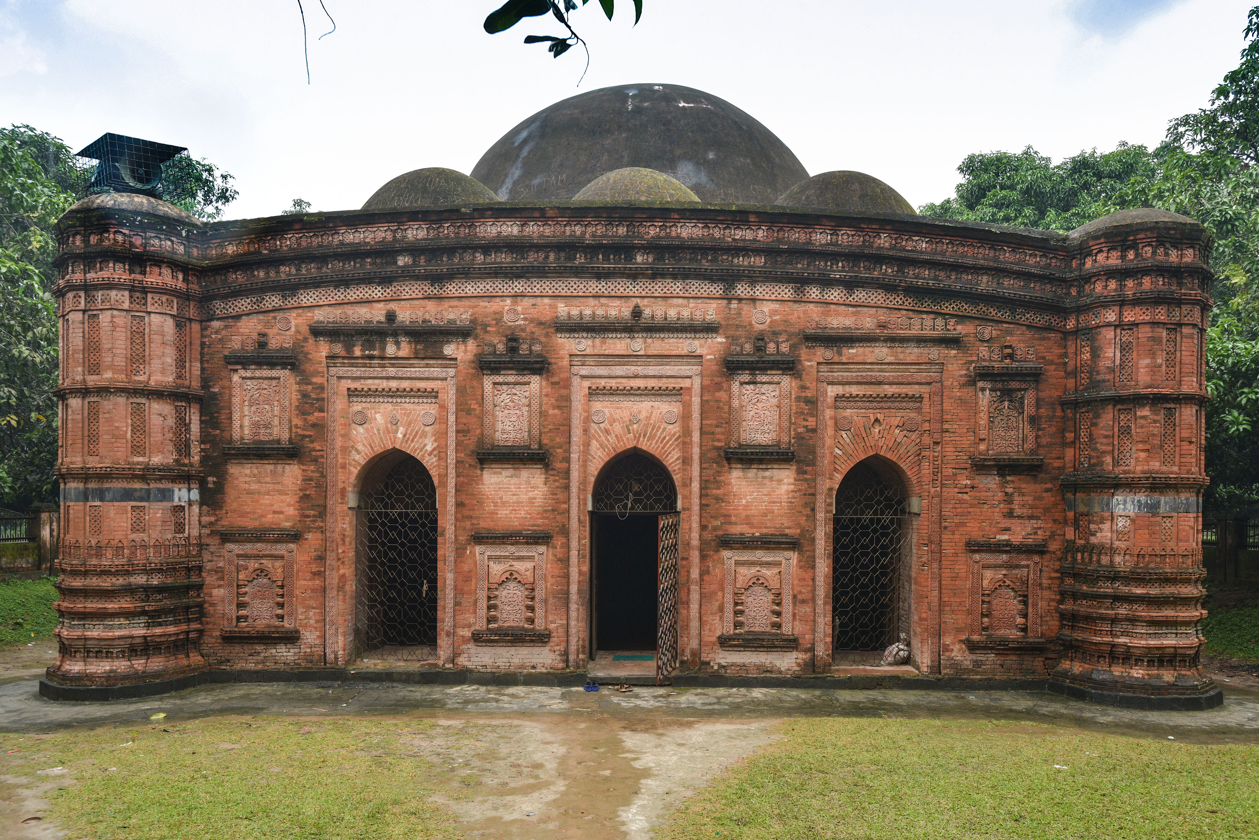 খানিয়া দীঘি মসজিদ